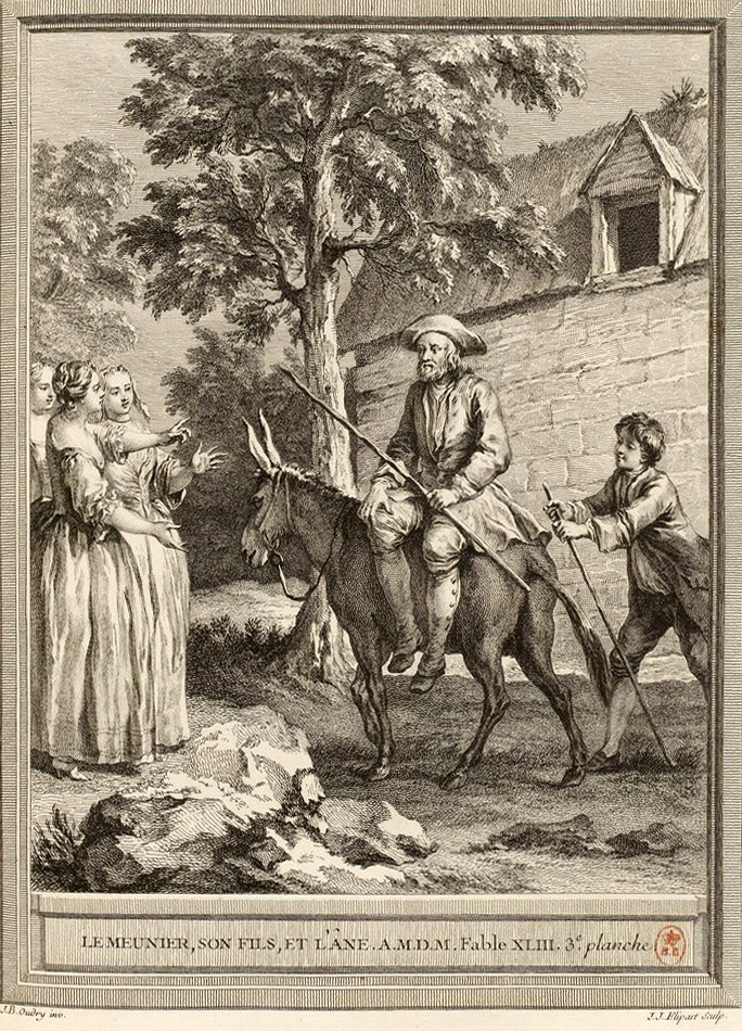 Gravure réalisée par Jean-Jacques Flipart d'après un dessin de Jean-Baptiste Oudry représentant la fable Le meunier, son fils et l'âne de Jean de La Fontaine (fable 1 du livre III). Cette gravure est parue dans l'édition complète des fables de La Fontaine, parue en quatre tomes chez l'éditeur Desaint & Saillant, rue saint Jean de Beauvais à Paris, 1755-1759.